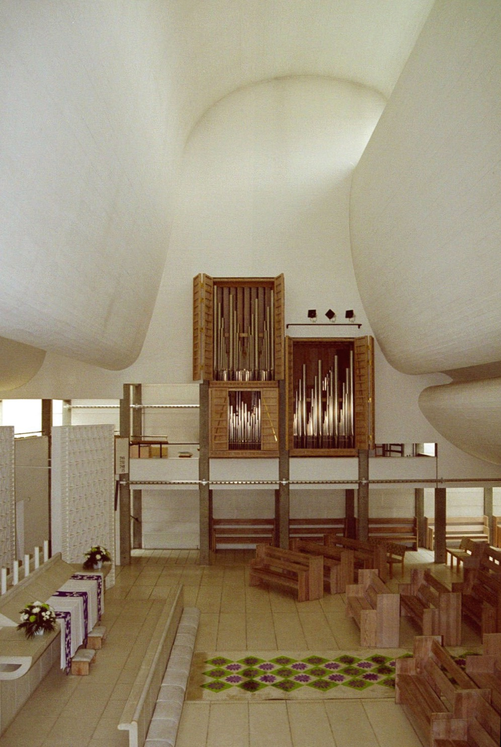 The interior of Bagsværd Church, Bagsværd Sogn, Sokkelund Herred, København Amt, Denmark.